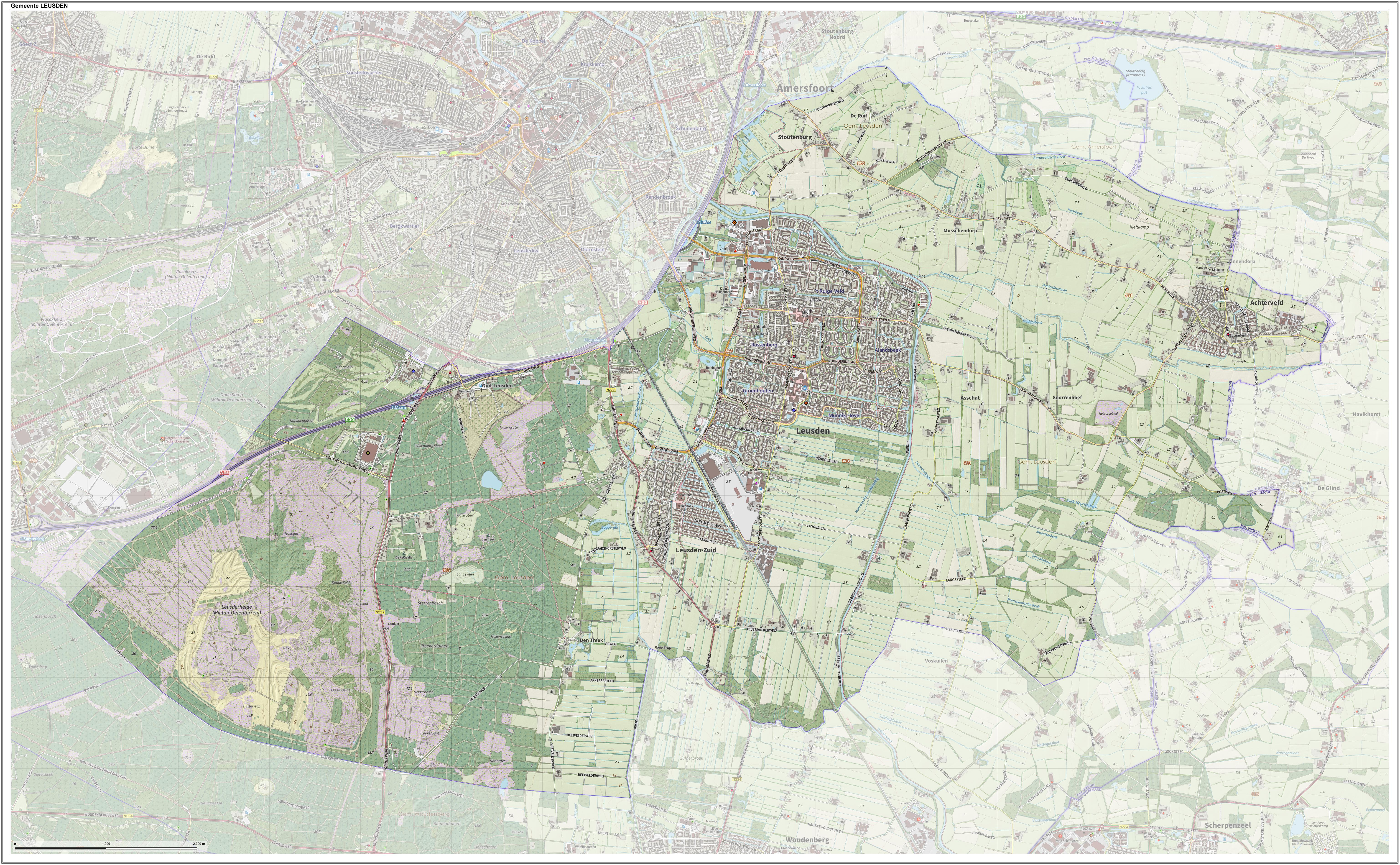 Topografische gemeentekaart. Resolutie: 400 pixels/km. Kaartbeeld samengesteld uit de open geodata van de Top10NL en Top25namen (Kadaster), Creative Commons-BY licentie. Gebouwvlakken uit open geodata BAG extract. Wegen uit de OpenStreetMap, OpenStreetMap community. Reliëfschaduw uit de Actuele Hoogtekaart AHN2. Samenstelling en kleurenschema: Jan-Willem van Aalst, met QGIS. Zie ook de Legenda.